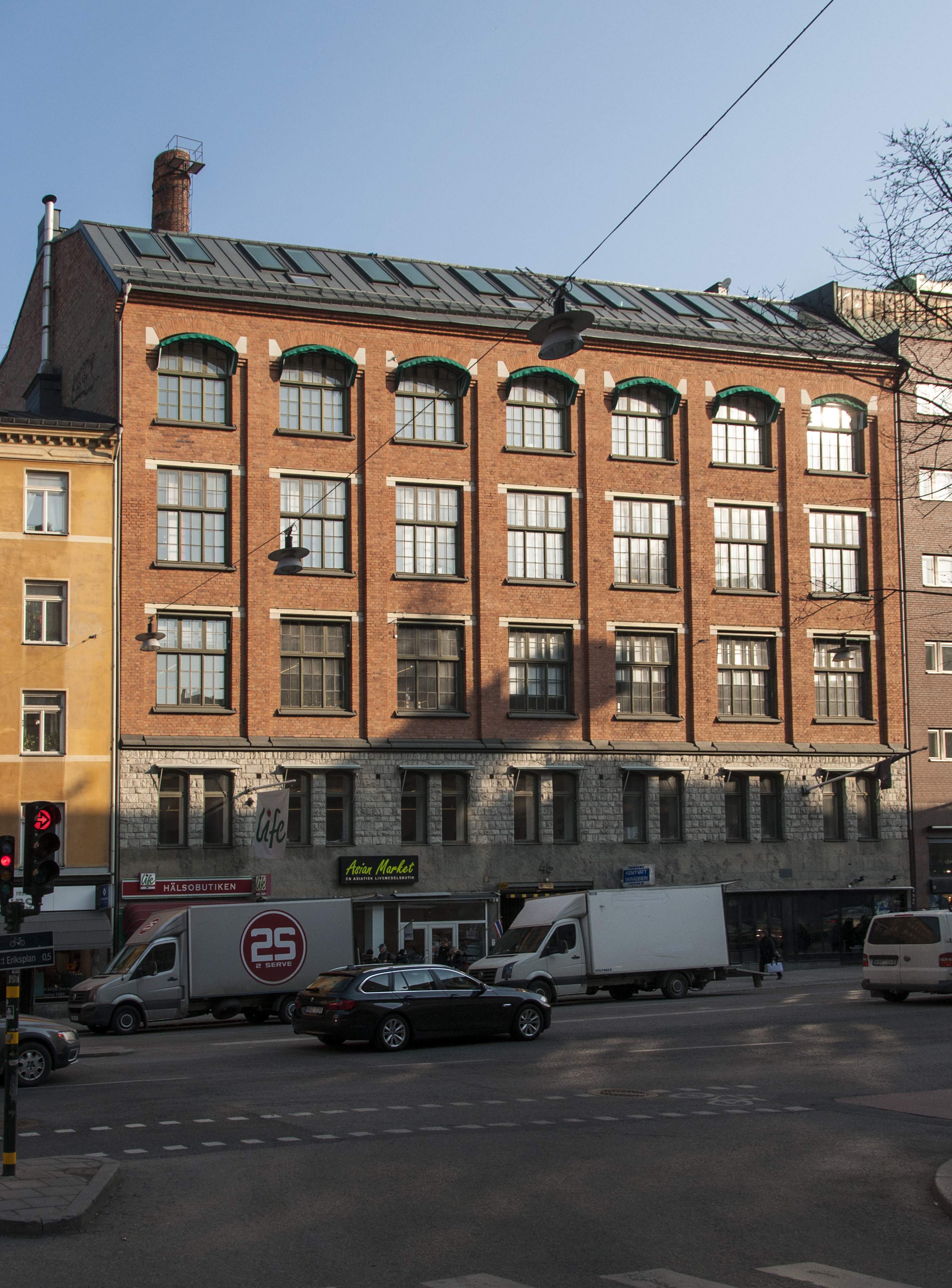 Roddaren 7, Sankt Eriksgatan 46, Nybyggnadsår 1899 - 1900, Fritz Söderberg (Arkitekt) Gottfrid Thorén (Byggmästare) R. Ingemarsson (Byggmästare) Ursprungligen innehöll byggnaderna A Wiklunds velocipedfabrik (Monark).